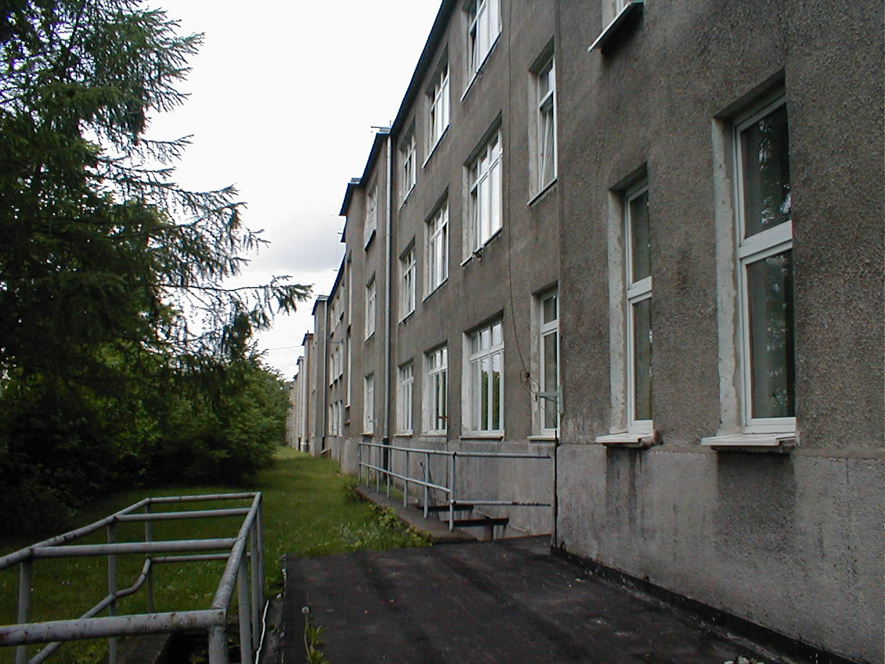 Budynek koszarowy nr 12 CSCS od uliczy Bydgoskiej stan w 10.06.2002 r.